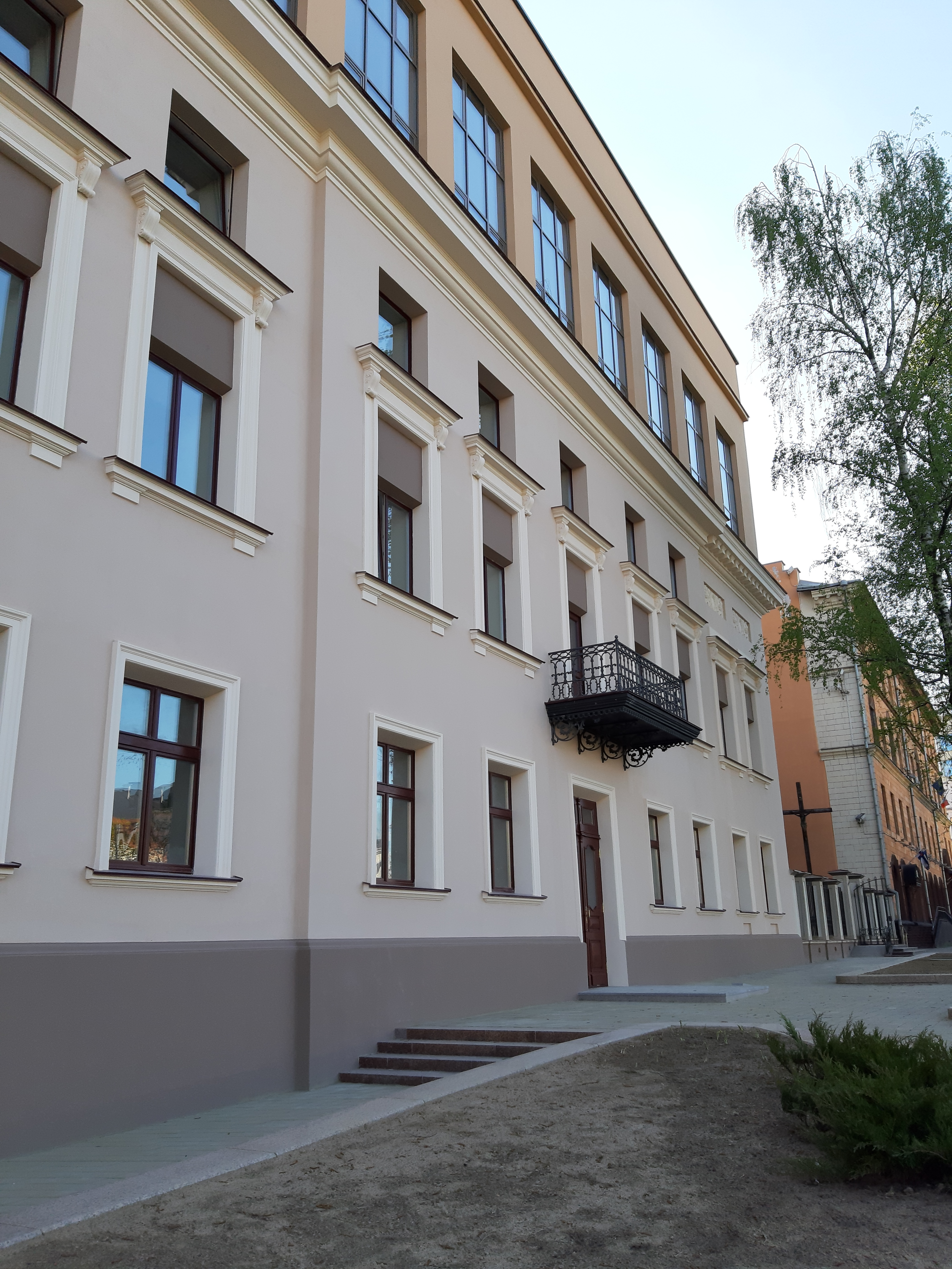 Мінск. Ад Маладзёжнай да Праспекта